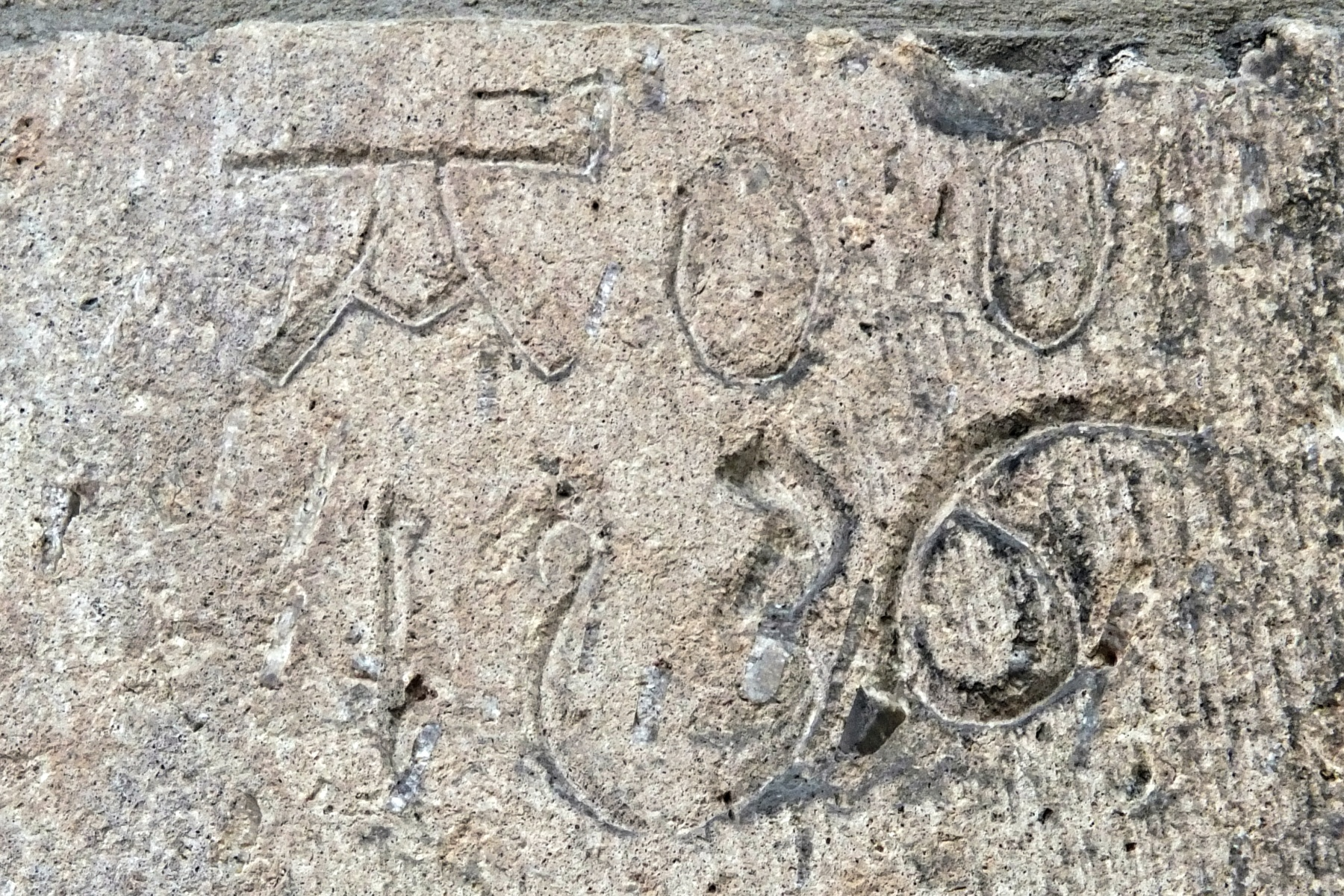 Hilden Reformationskirche Jahreszahl 1236